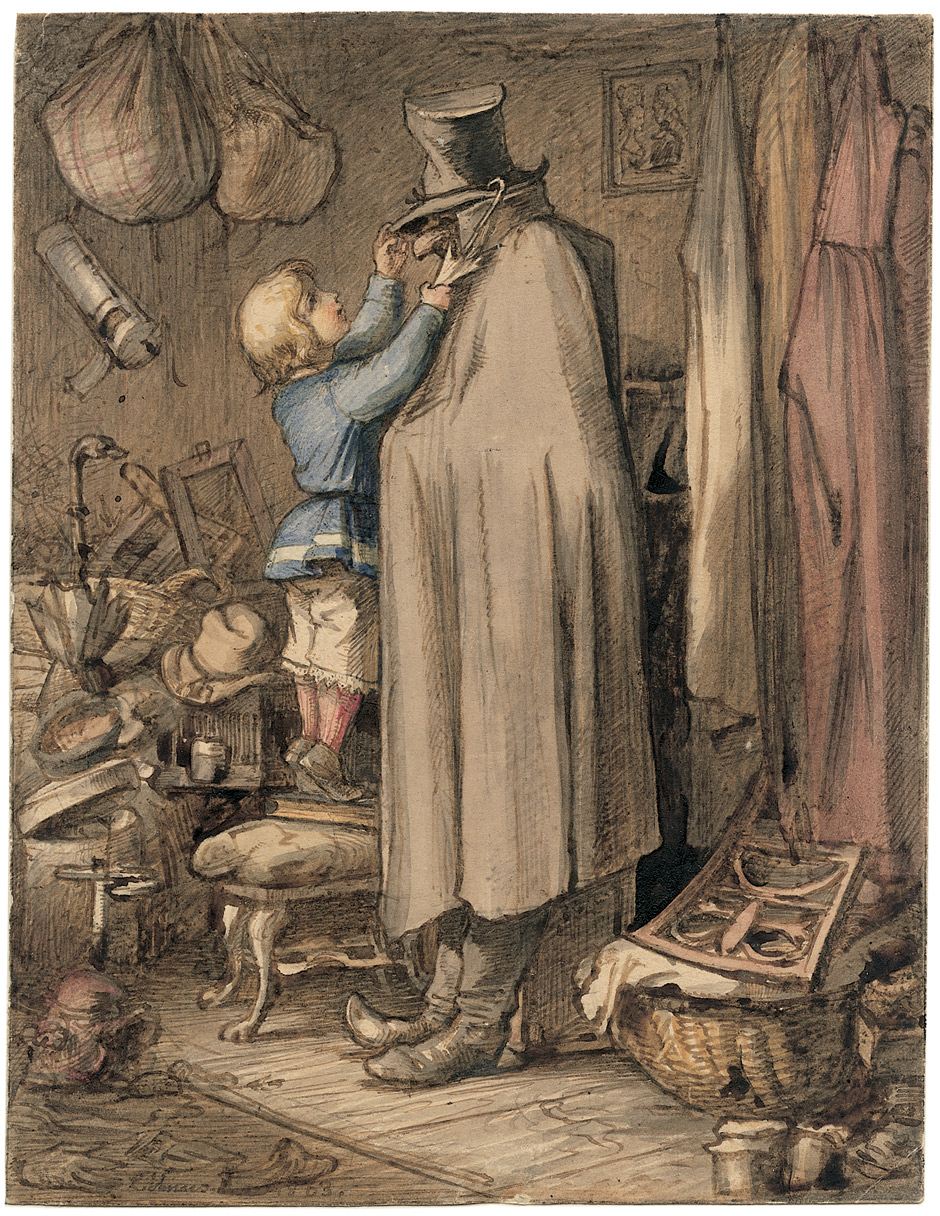 Auf dem Dachboden: Ein Knabe verkleidet einen Garderobenständer in eine Schreckgestalt. Aquarell über Feder in Braun, auf Velin. 15 x 11,5 cm. Unten links signiert und datiert: "L.Venus 1863".